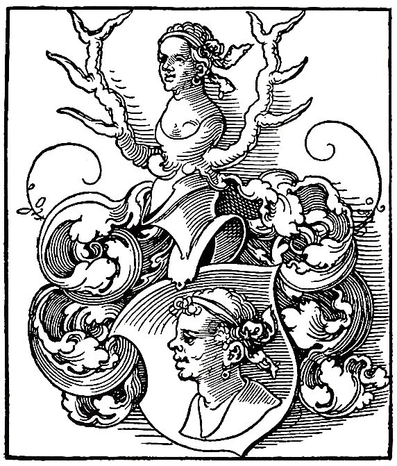 Wappen des Hartmann Maurus, Jurist; Professor der Rechte in Köln; Reichskammergerichtsassessor († 1537) (Digitalisat)